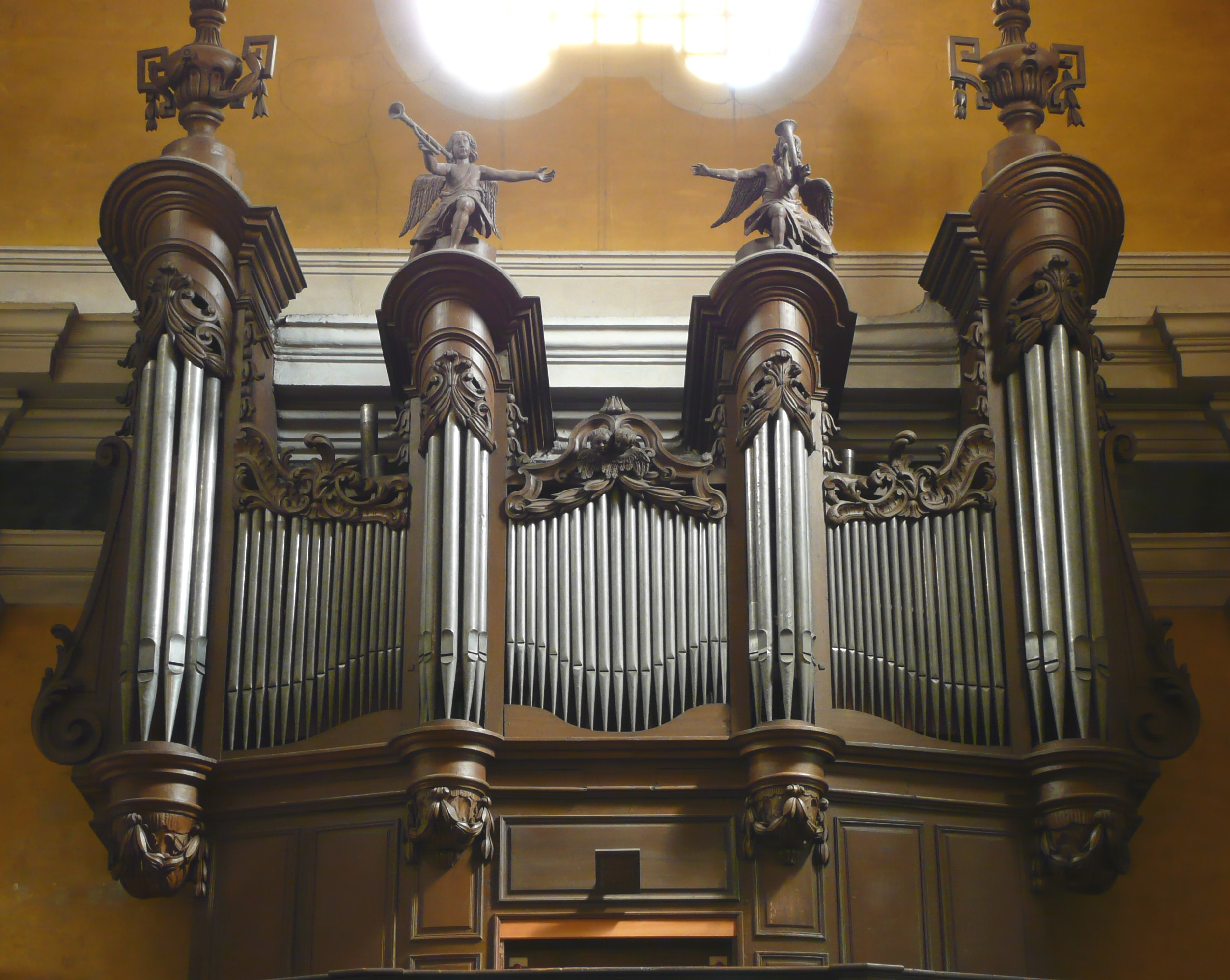 Dans les Alpes-Maritimes (France), l'orgue de l'église Saint-Michel de la ville de Villefranche-sur-Mer, construit en 1790 par Honoré & Antoine Grinda.